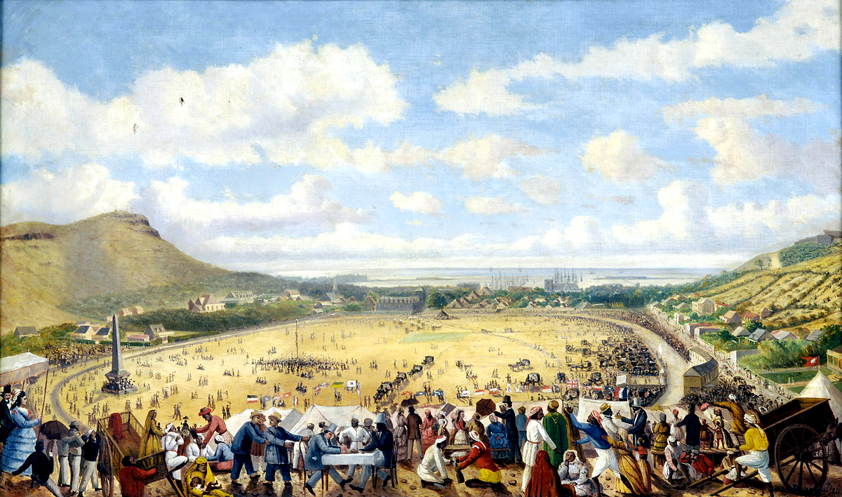 Champ de Mars, Port Louis 1880. Signiert. Datiert (18) 80. Öl auf Leinwand, 60 x 98 cm